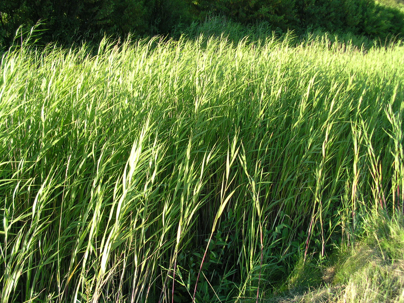 Phragmites_australis_2